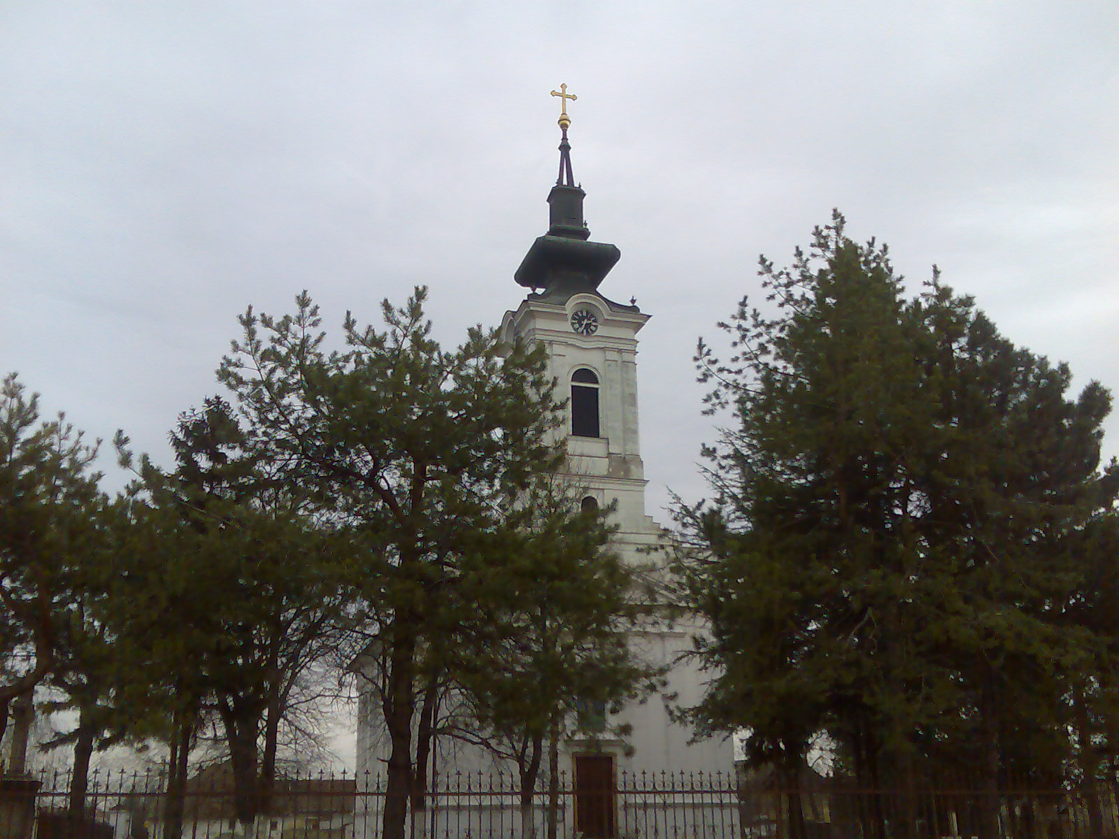 Crkva Sv. Nikolaja u Kaću